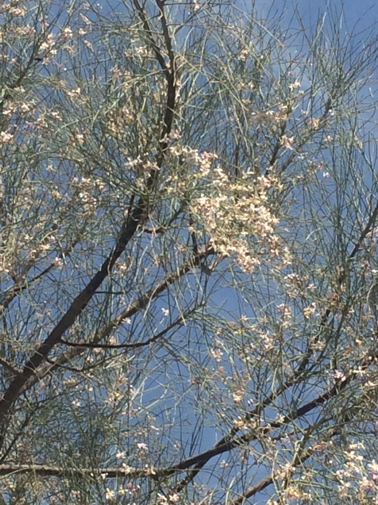 أزهار شجرة الشوع في سلطنة عمان وادي بني خروص بمحافظة جنوب الباطنة الازهار قرنفلية عطرية والاوراق اسطوانية